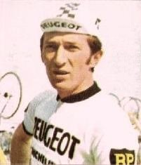 Roger Pingeon (1972), 'Sprint 72' p.20, Panini figurina n°88.